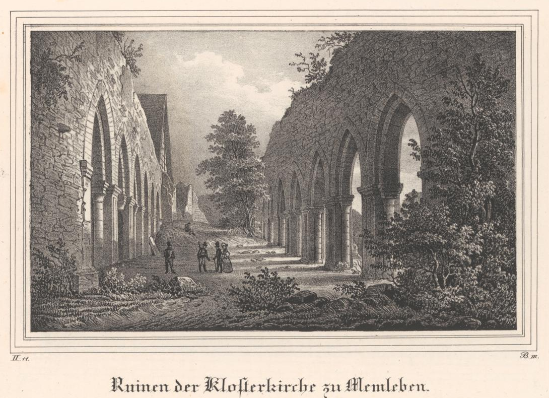 Ruinen der Klosterkirche zu Memleben, Lithographie : 18 x 12 cm, Heinrich Wilhelm Teichgräber